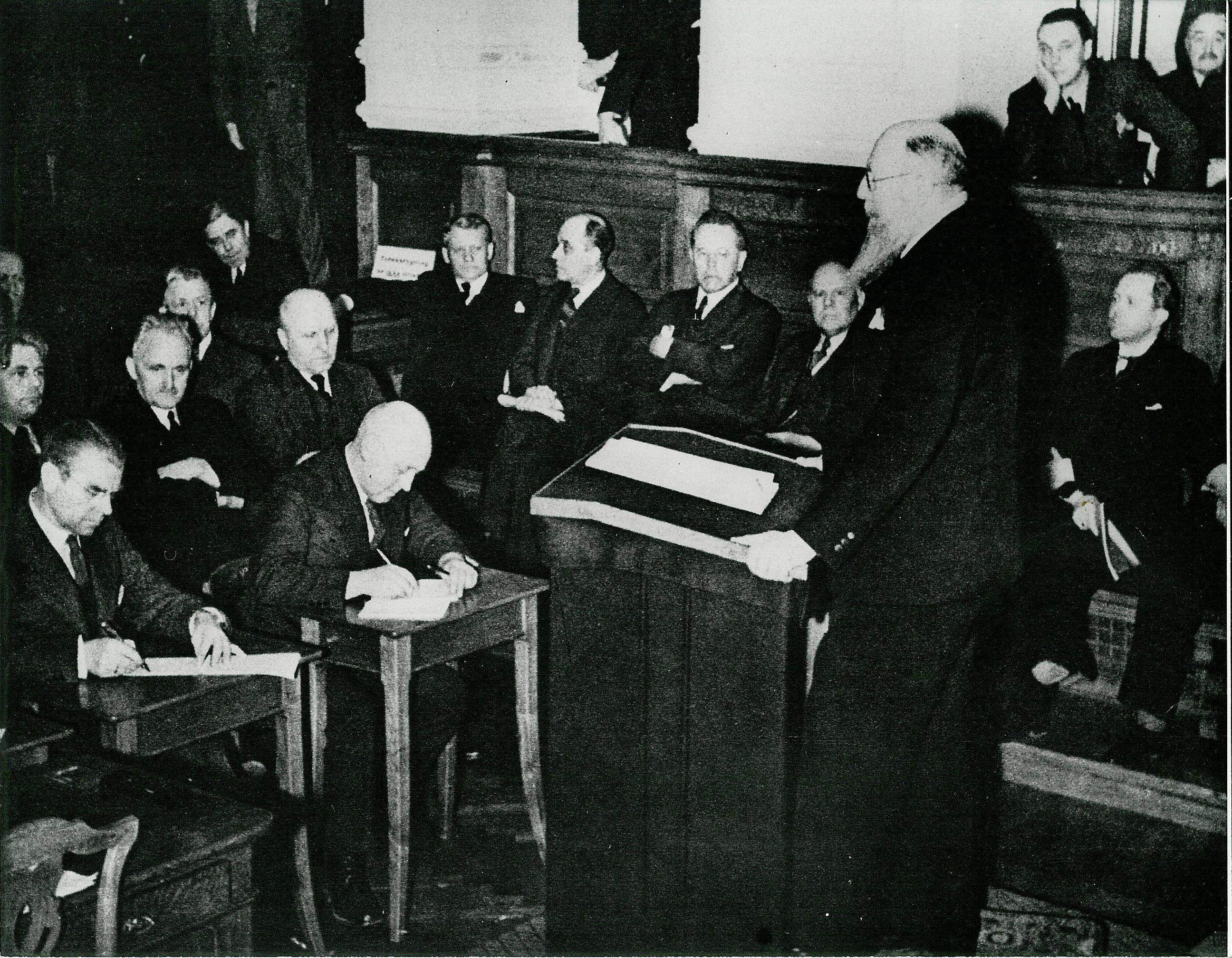 Statsminister Th. Stauning taler til medlemmer af Rigsdagens to ting. Sted: Christiansborg, København Dato: 9. april 1940 Se flere billeder her: Rights: More about The Museum of Danish Resistance (Frihedsmuseet)